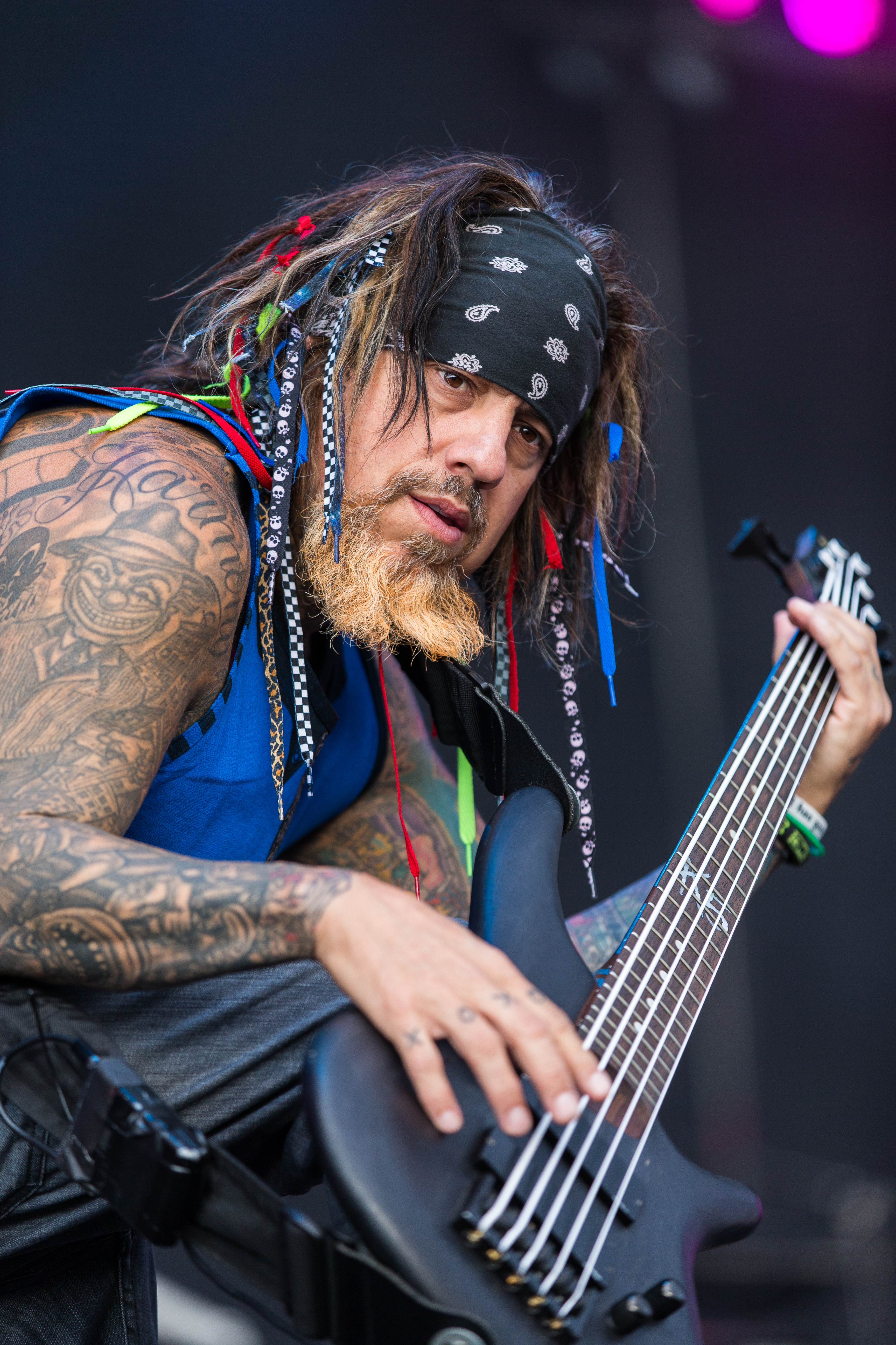 Rock'n'Heim Rock Festival Hockenheim August 2014